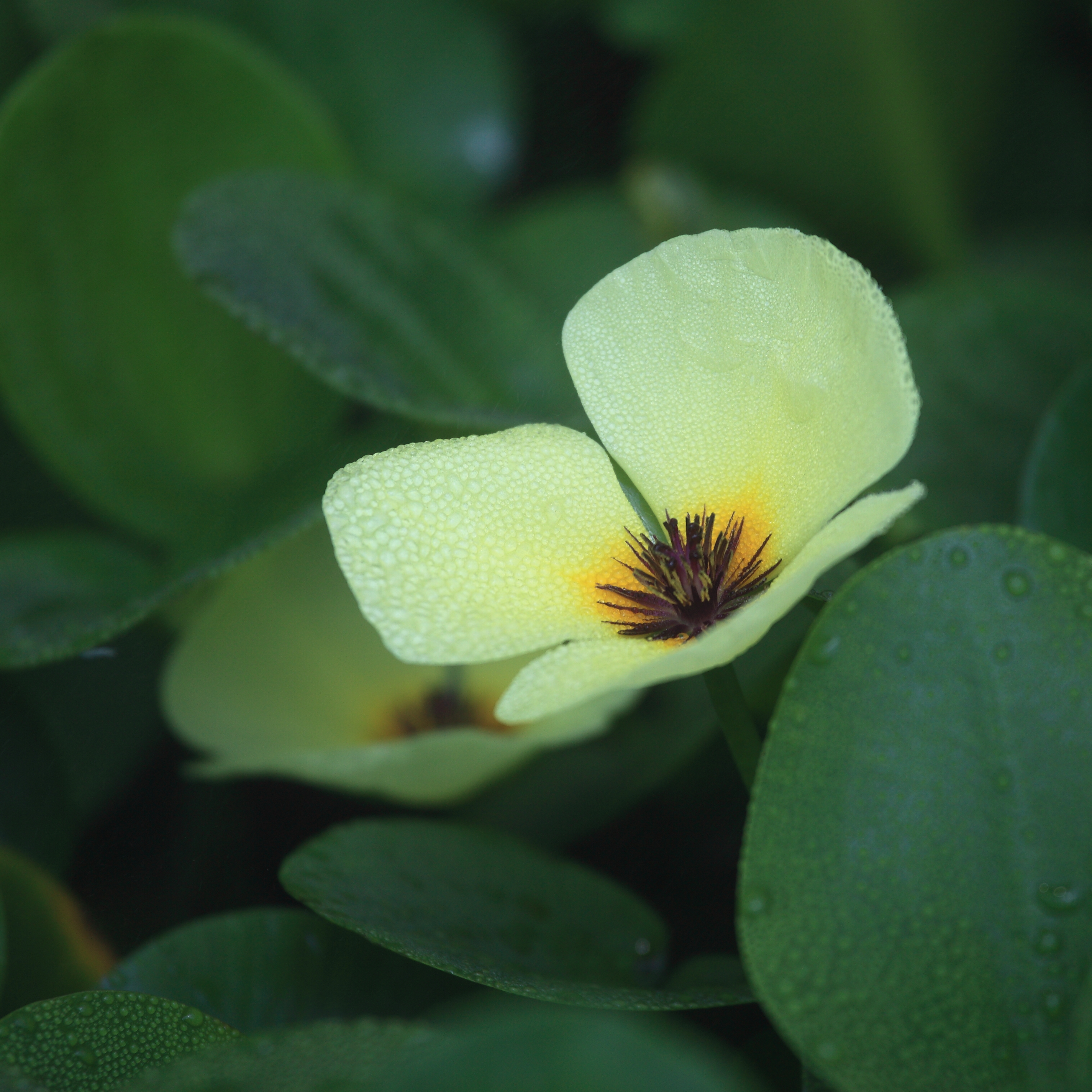 Tsukuba Botanical Garden, Tsukuba-shi(city) Ibaraki-ken(Prefecture), Japan ???(??????)???? ???????(??????????????)